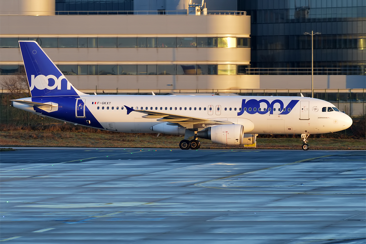 JOON, F-GKXT, Airbus A320-214